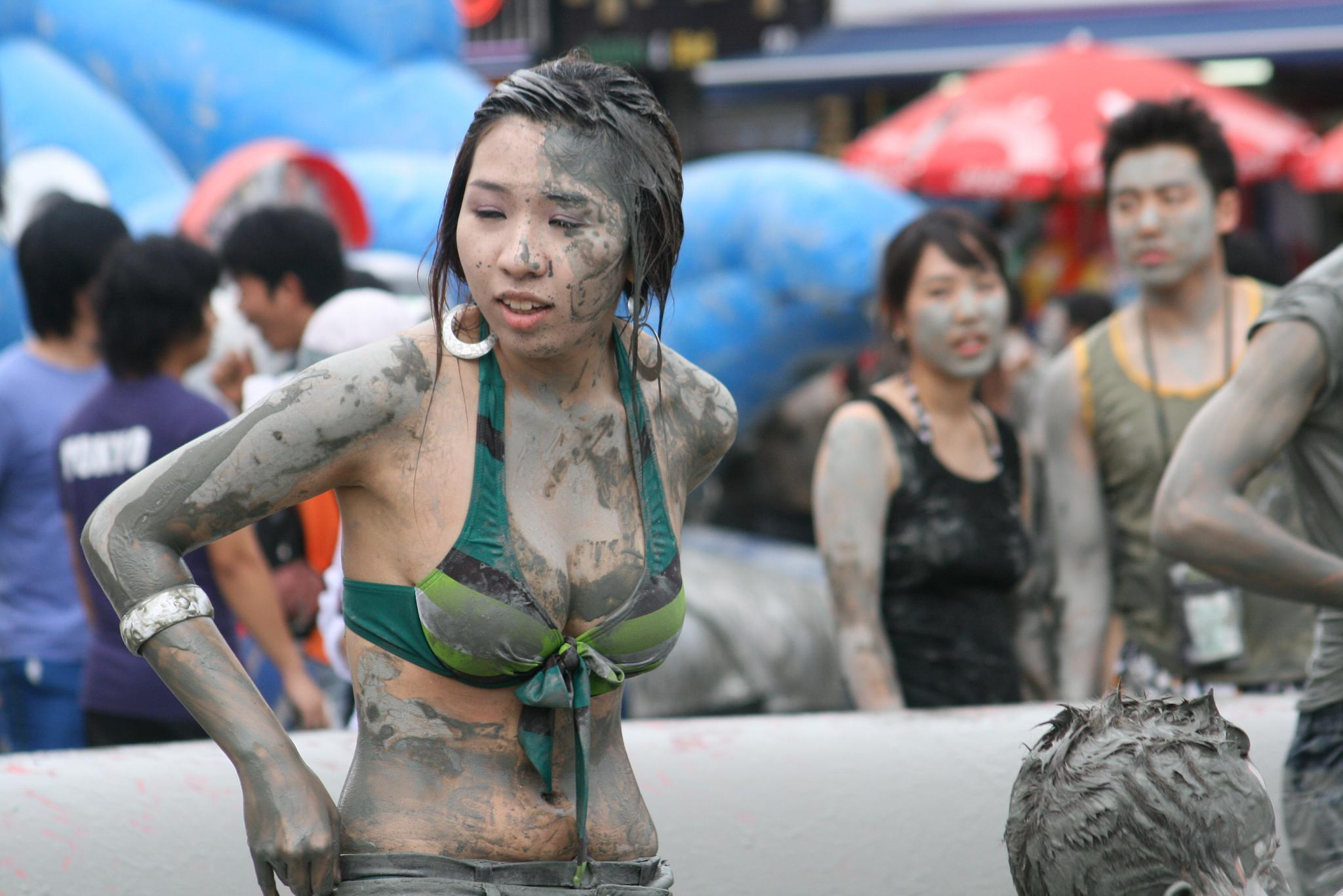 Mud Fest 2008